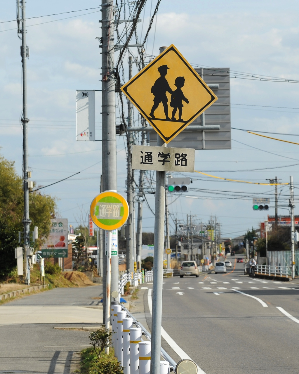 道路標識「通学路」（手前：標識令による「学校あり」の標識と補助標識「通学路」の組み合わせ、奥：愛知県独自の標識「通学路」）